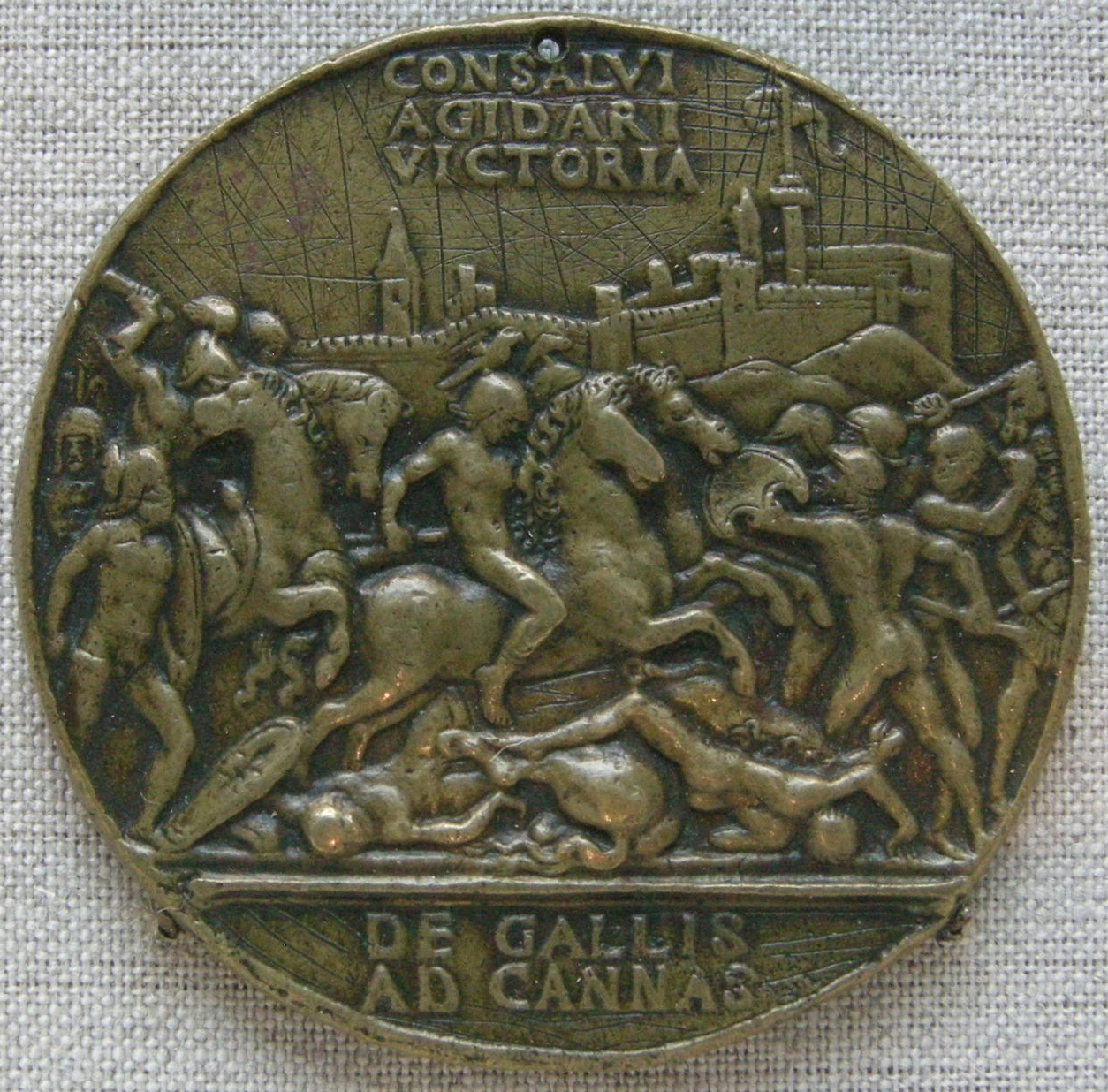 Il moderno, battaglia di canne, 1503-1504